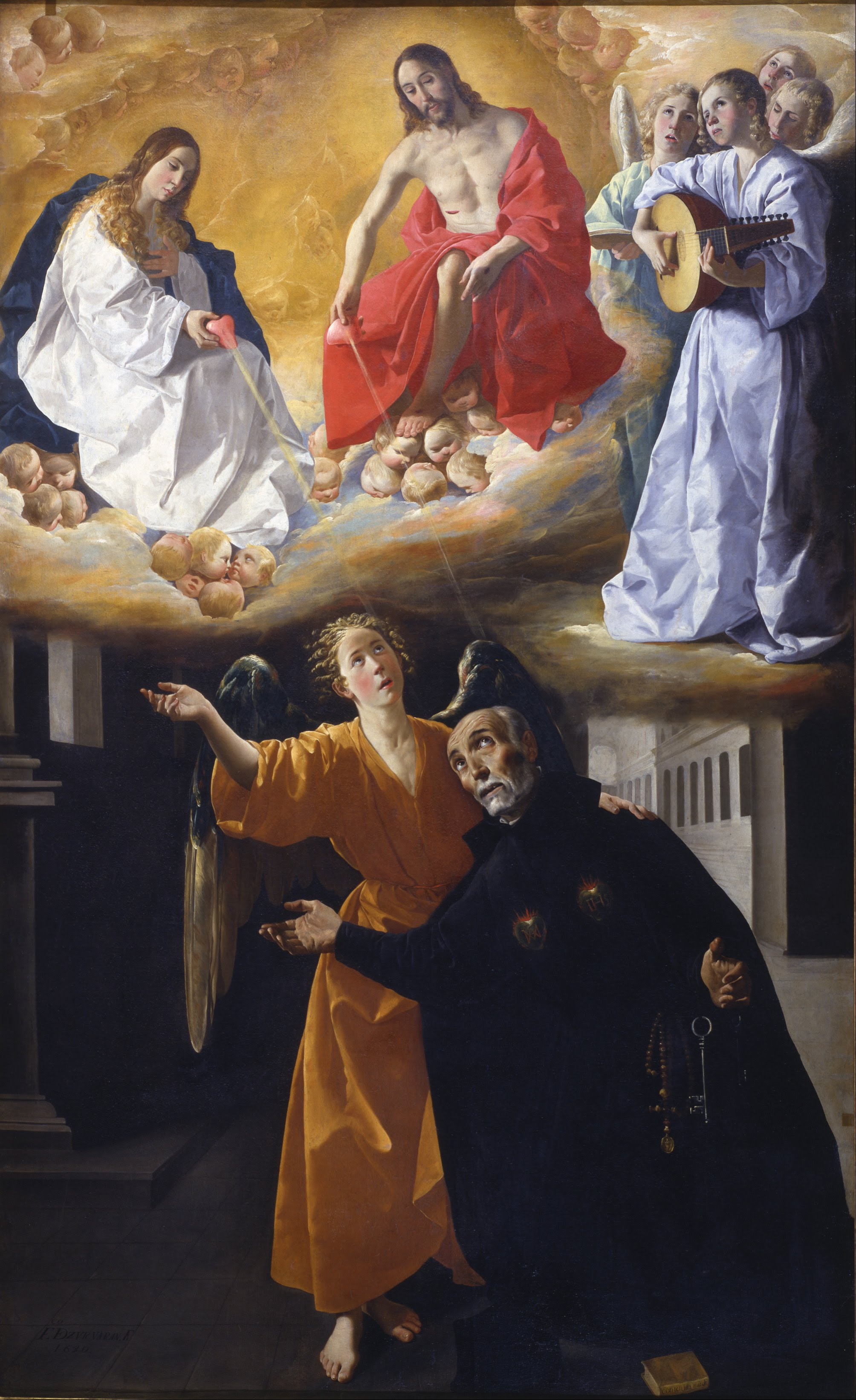 La obra representa al jesuita San Alonso Rodríguez teniendo una visión y contemplando a Jesucristo y a la Virgen María.